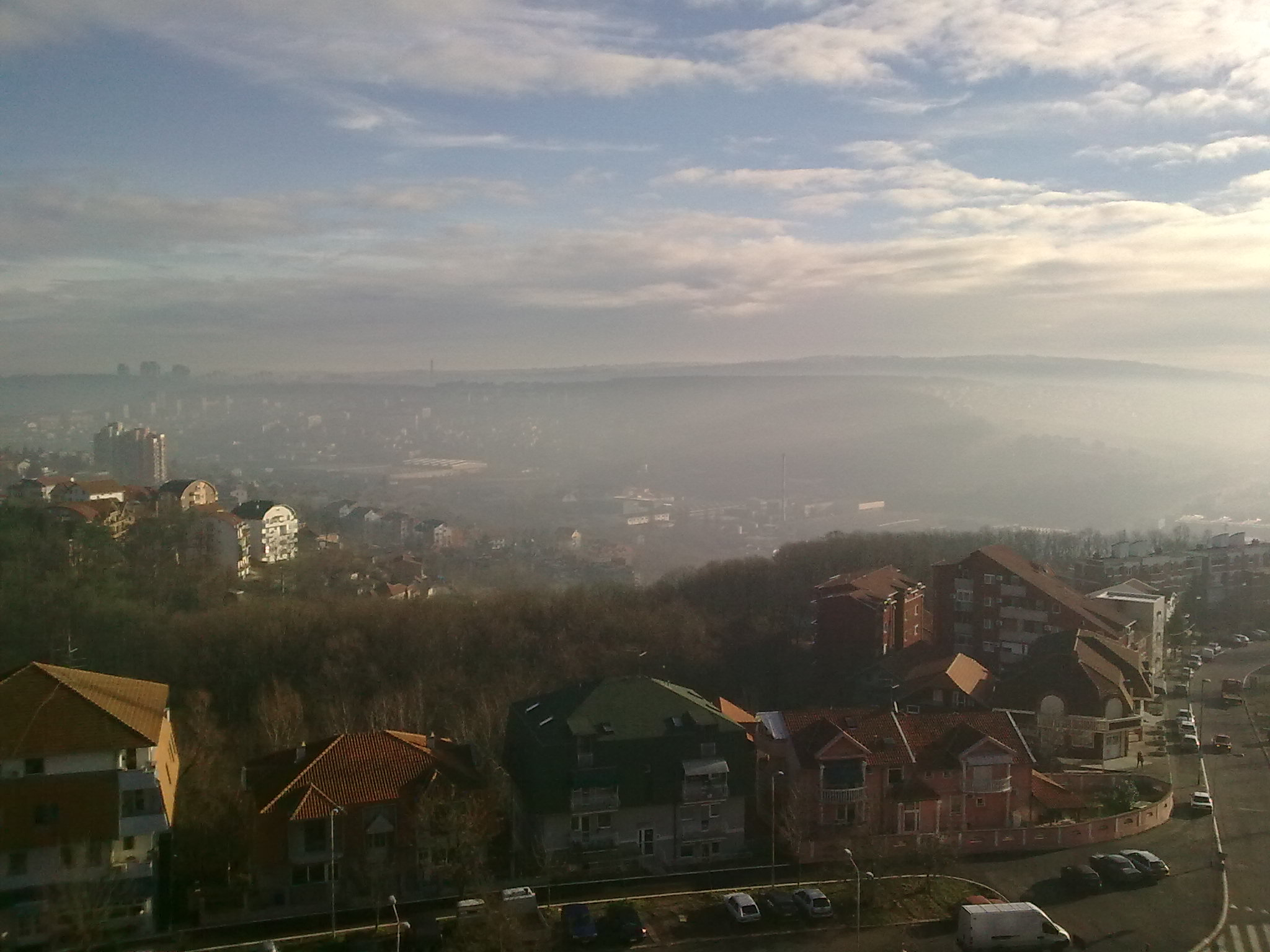 Видиковачки Венац у раним јутарњим сатима. У другом плану се види крај Видиковца и почетак Раковице а у задњем плану и 5 солитера, крај ВМА.